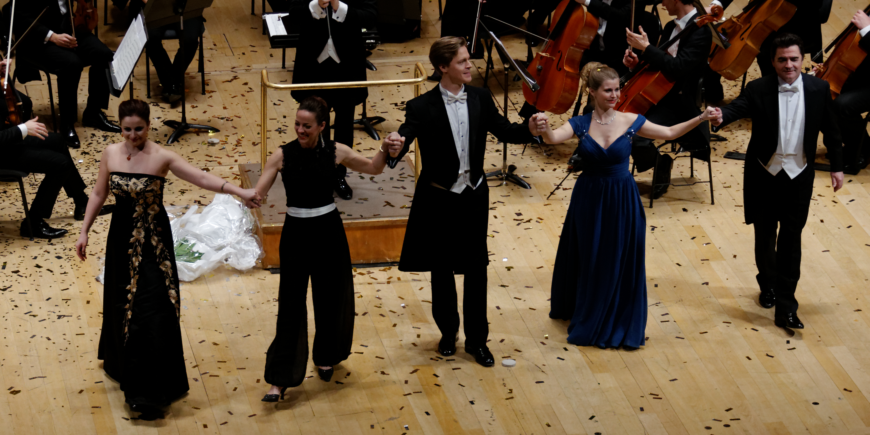 De gauche à droite : Sophie Gordeladze (soprano), Lysianne Tremblay (mezzo-soprano), Georg Klimbacher (bartyon), Beate Ritter (soprano), Franz Supper (ténor). Extraits de la Chauve-souris de Johann Strauss II, Auditorium Maurice Ravel. Nouvel an viennois, décembre 2015